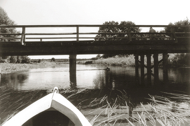 Ise kurz vor Gifhorn vom (ausgeliehenen) Paddelboot aus gesehen